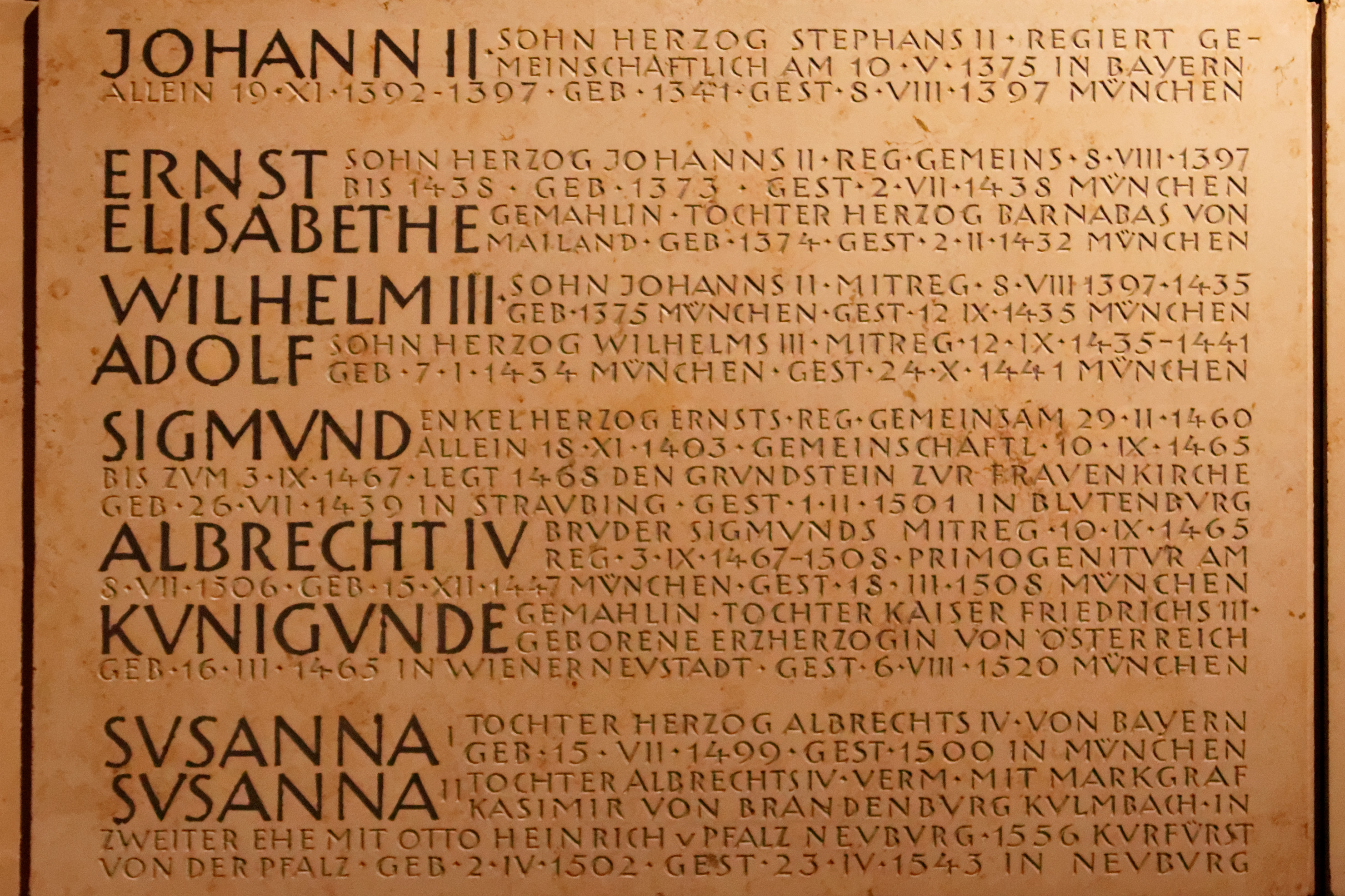 Gedenktafel an die in der Frauenkirche beigesetzten Wittelsbacher in der Krypta der Frauenkirche